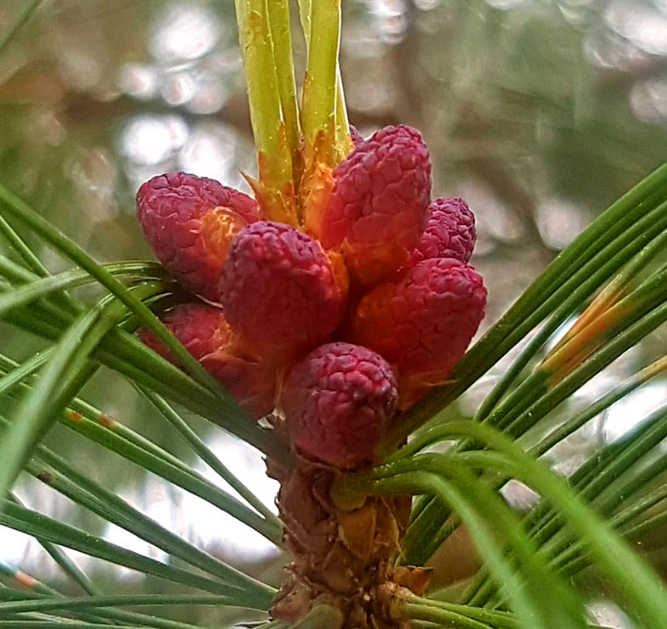 Flowering pine cones